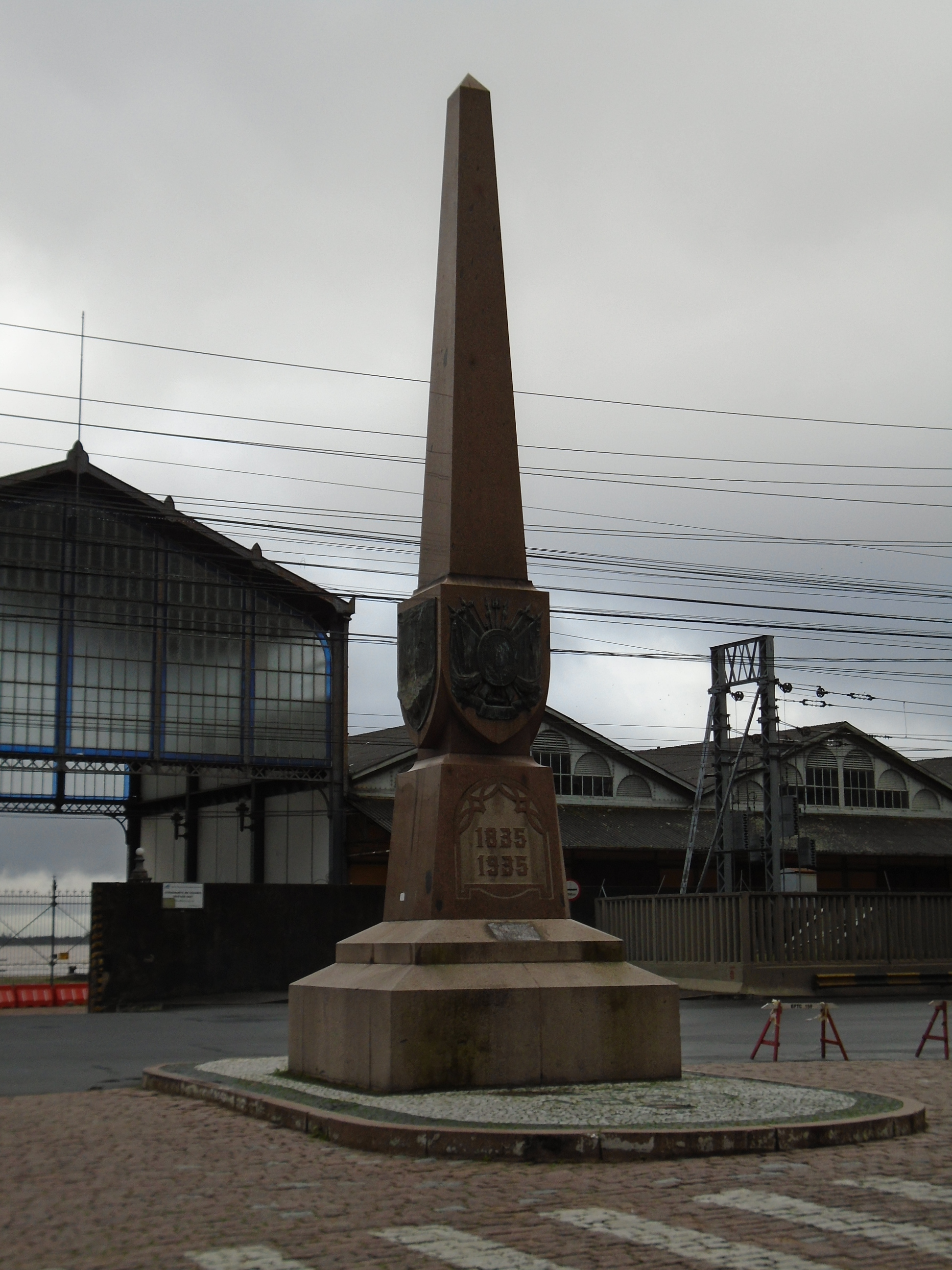 Obelisco em comemoração do Centenário Farroupilha, doado ao Rio Grande do Sul pela colônia Portuguesa em 1935, esculido pelo italiano Luis Sanguin.